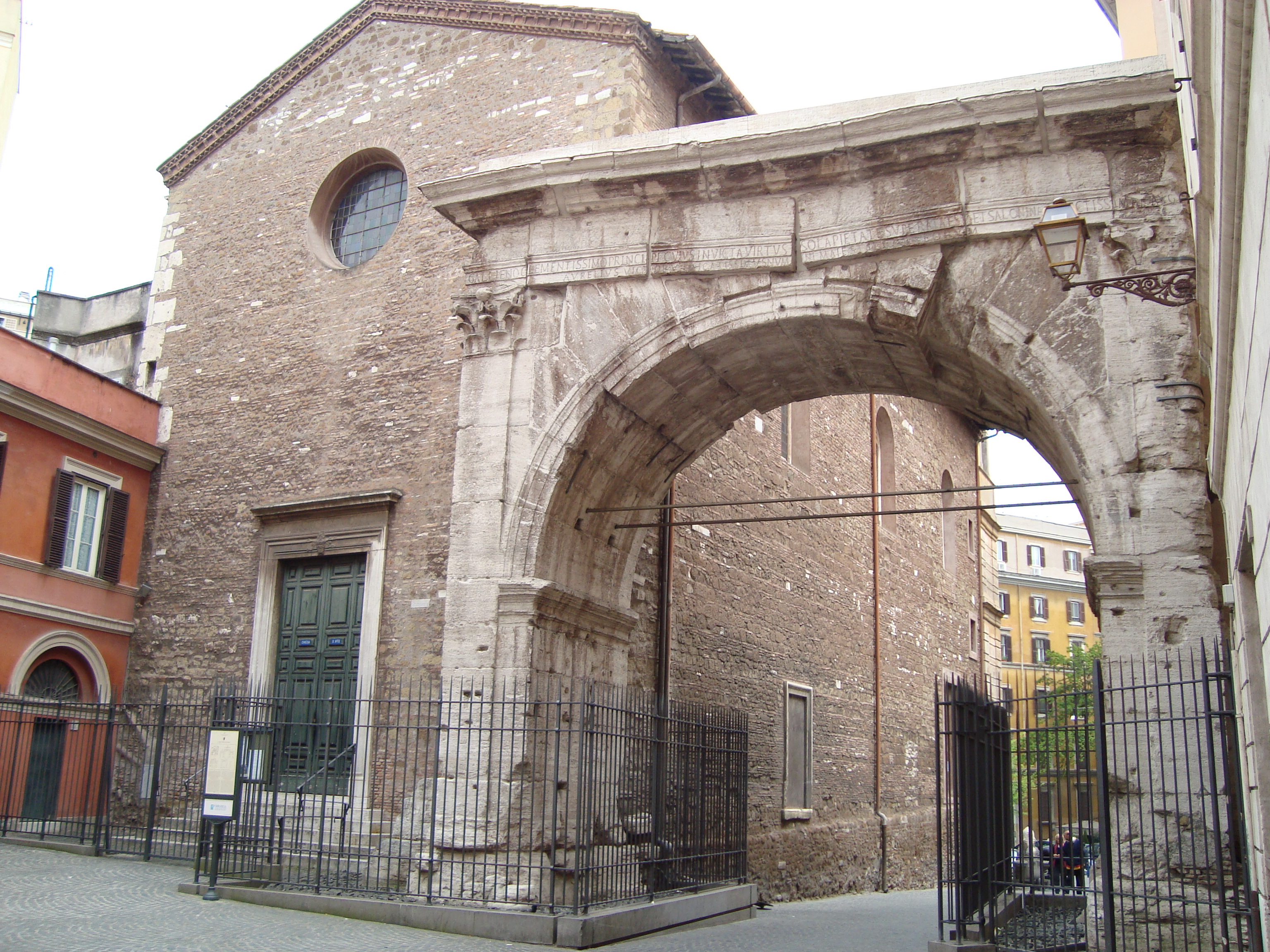 Eglise dei Santi Vito e Modesto facade arrière à Rome et l'Arco Gallieno